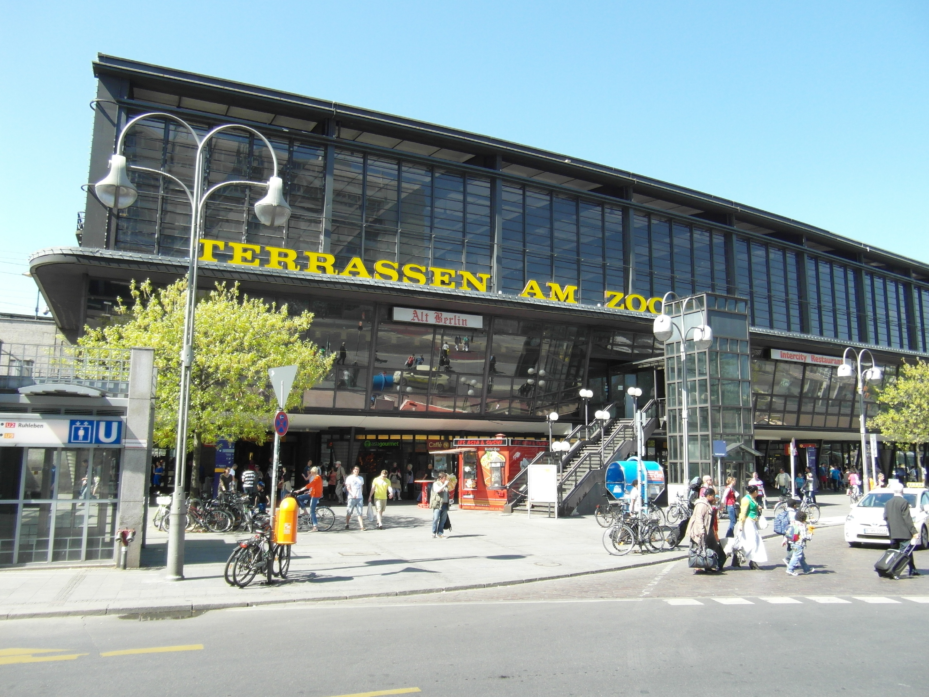 Berlin - Bahnhof Zoologischer Garten - Stadtbahn